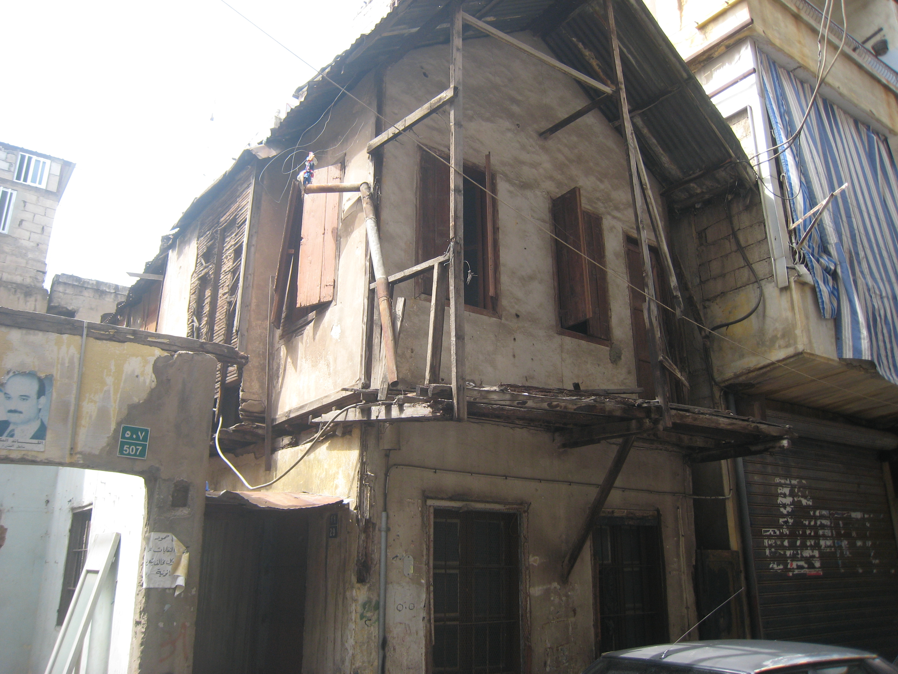 Une maison de Bourj Hammoud (Beyrouth - Liban)